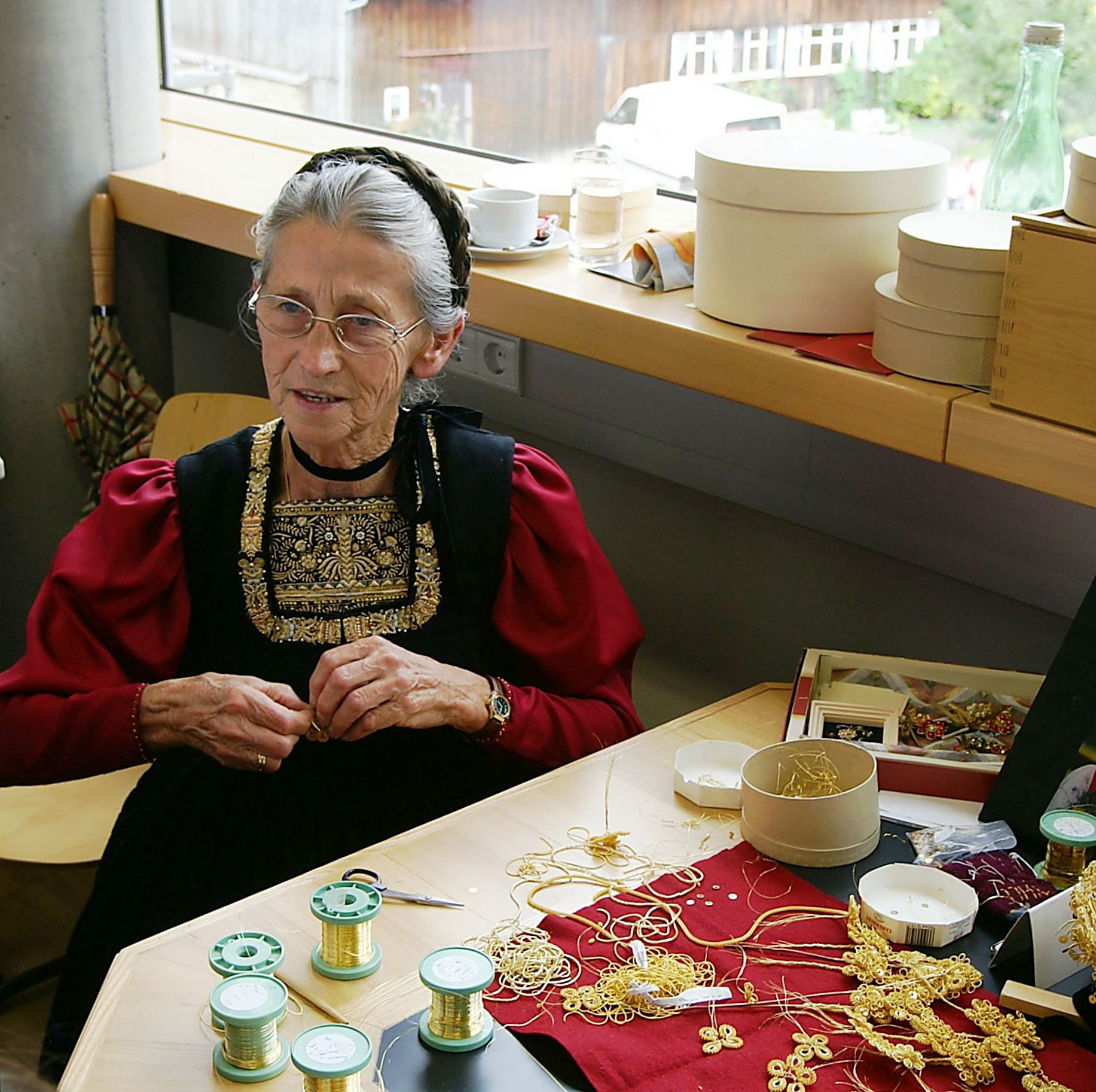 Zur 8. Bregenzerwälder Handwerksausstellung vom 14.-19. August 2007 zeigt diese Frau in der Wäldertracht der Juppe Näharbeiten. Bezau im Bregenzerwald.